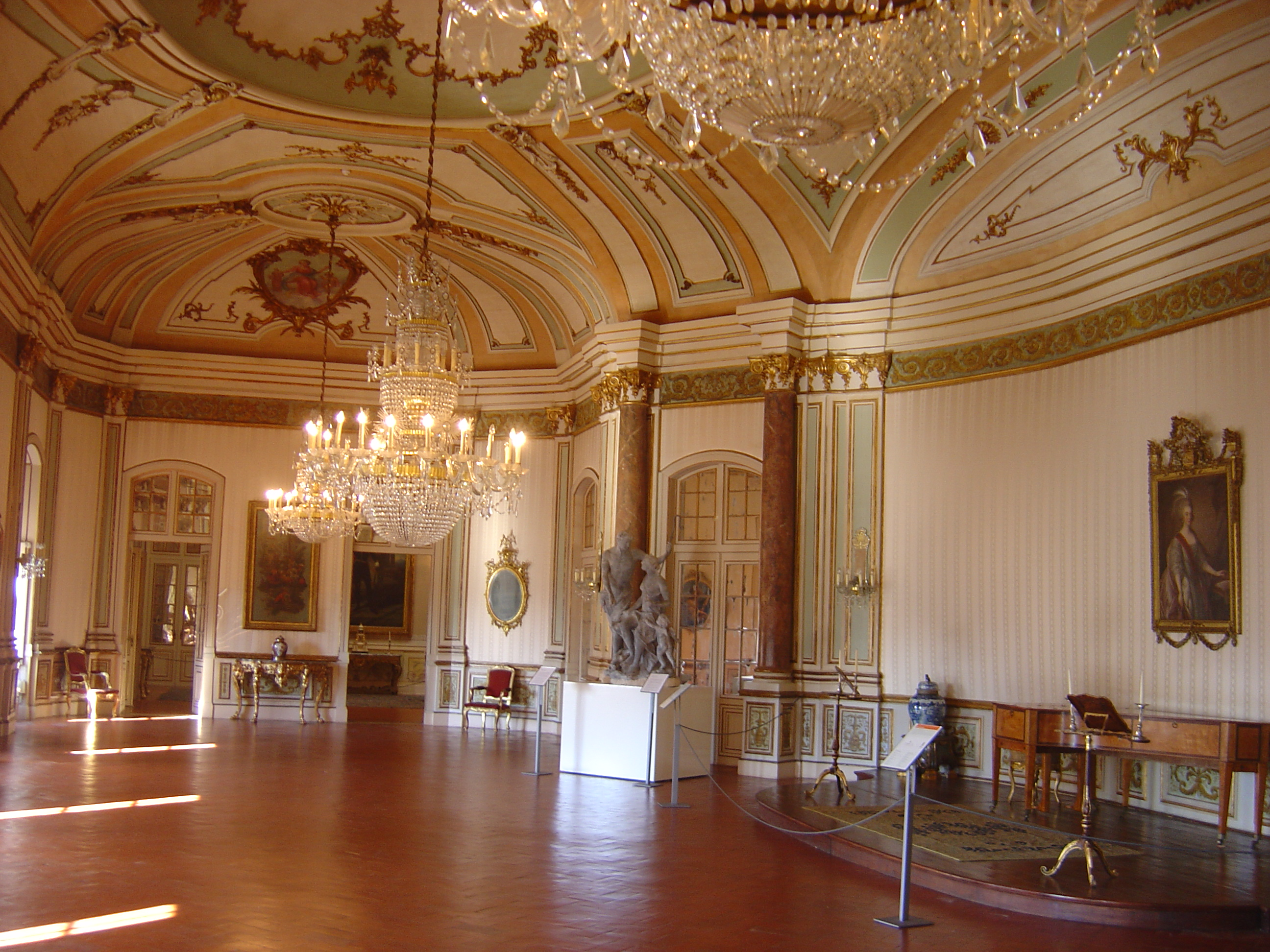 Queluz National Palace, Portugal